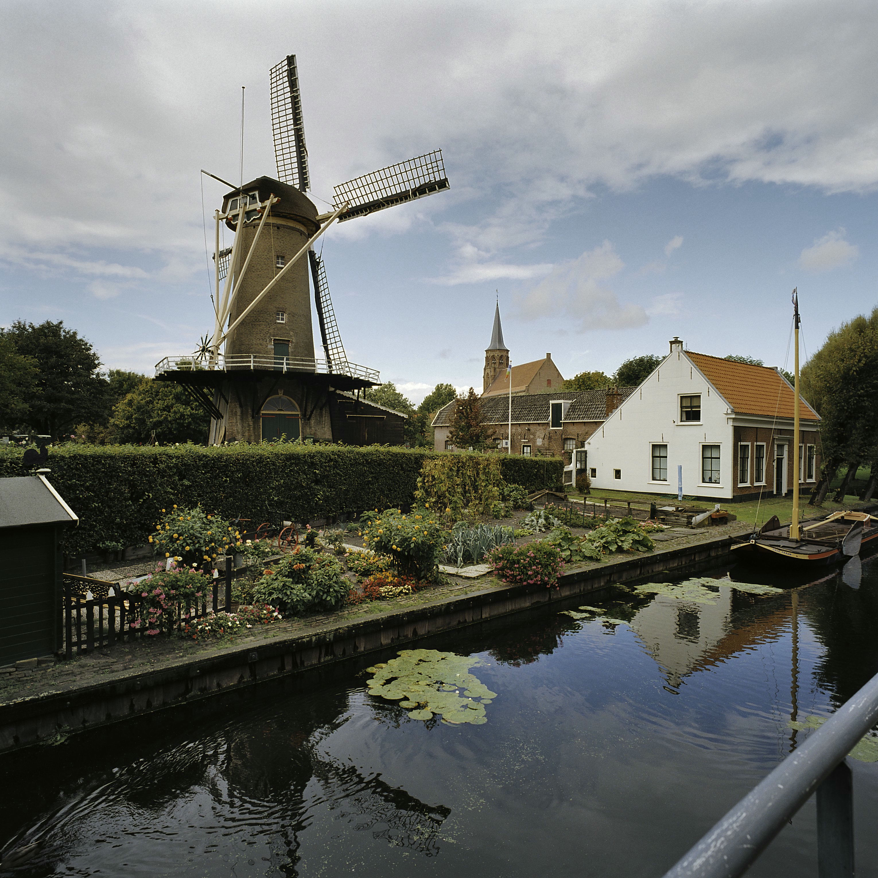 Windmolen De Korenaar: Overzicht molen met een deels gepleisterde molenaarswoning (opmerking: Gefotografeerd voor Monumenten In Nederland Zuid-Holland)